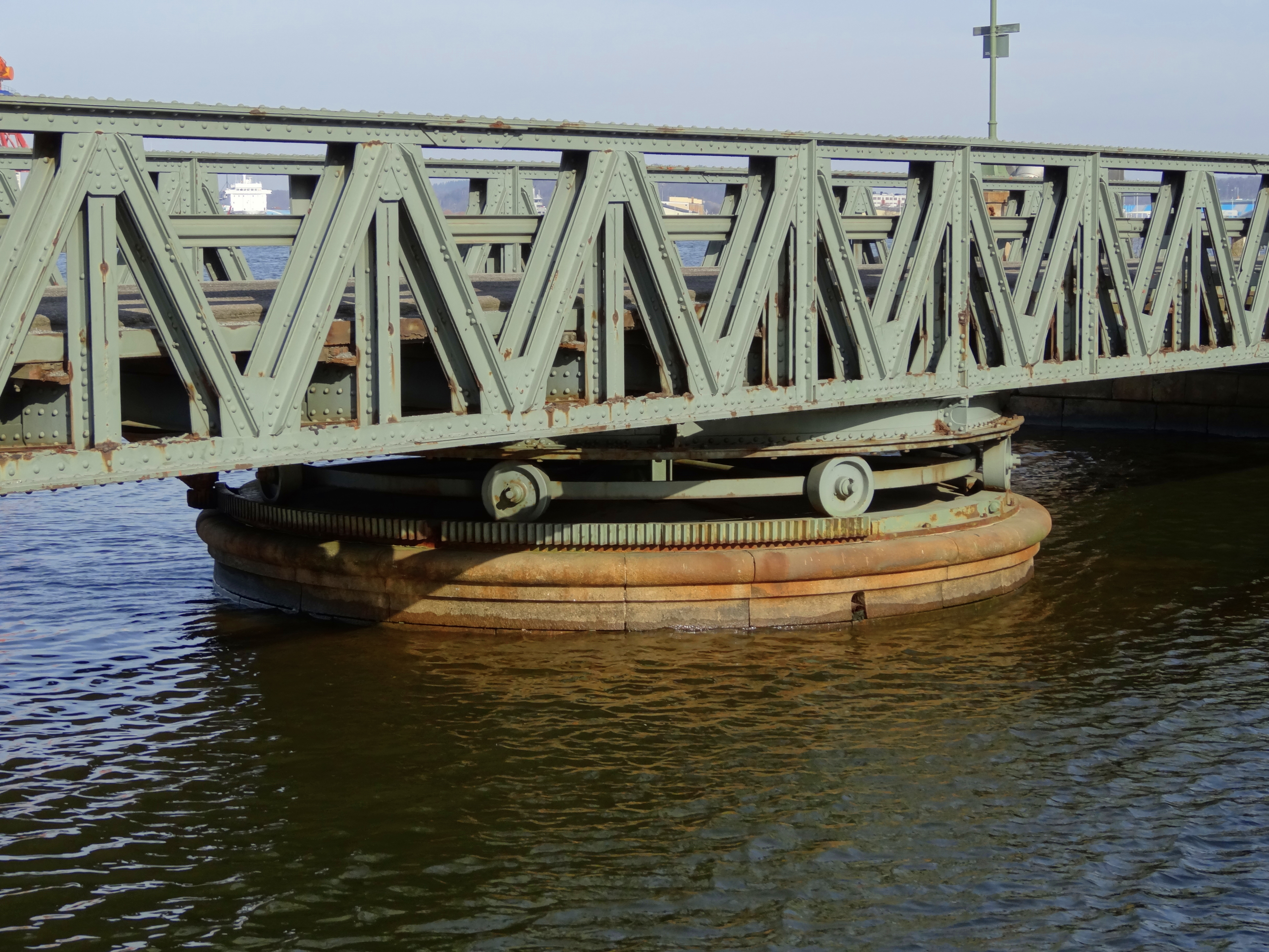 Stora Bommens bro i Göteborg -- en f.d. svängbar järnvägsbro.